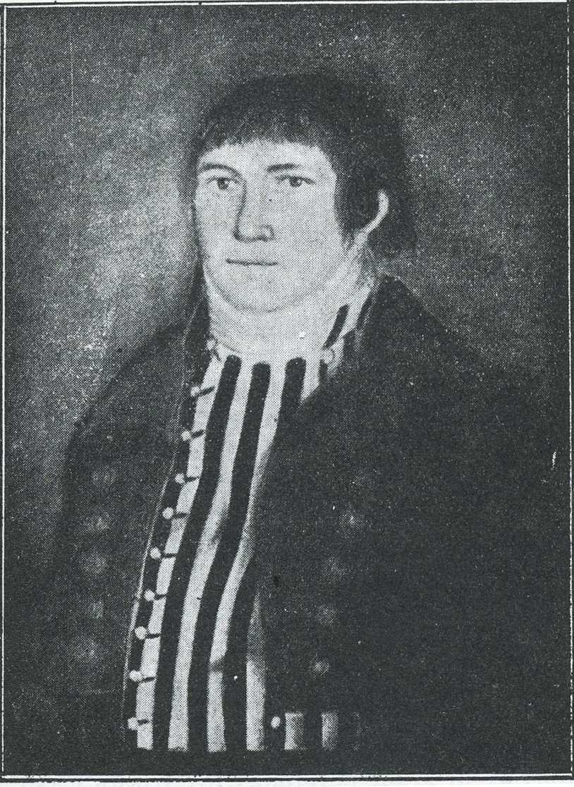 Auguste Hay de Bonteville (1775-1846) - Battle of Saint-Aubin-du-Cormier (1796)